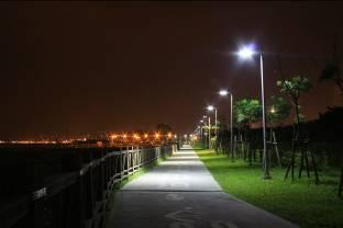 新北市淡水區竹圍河濱自行車道。